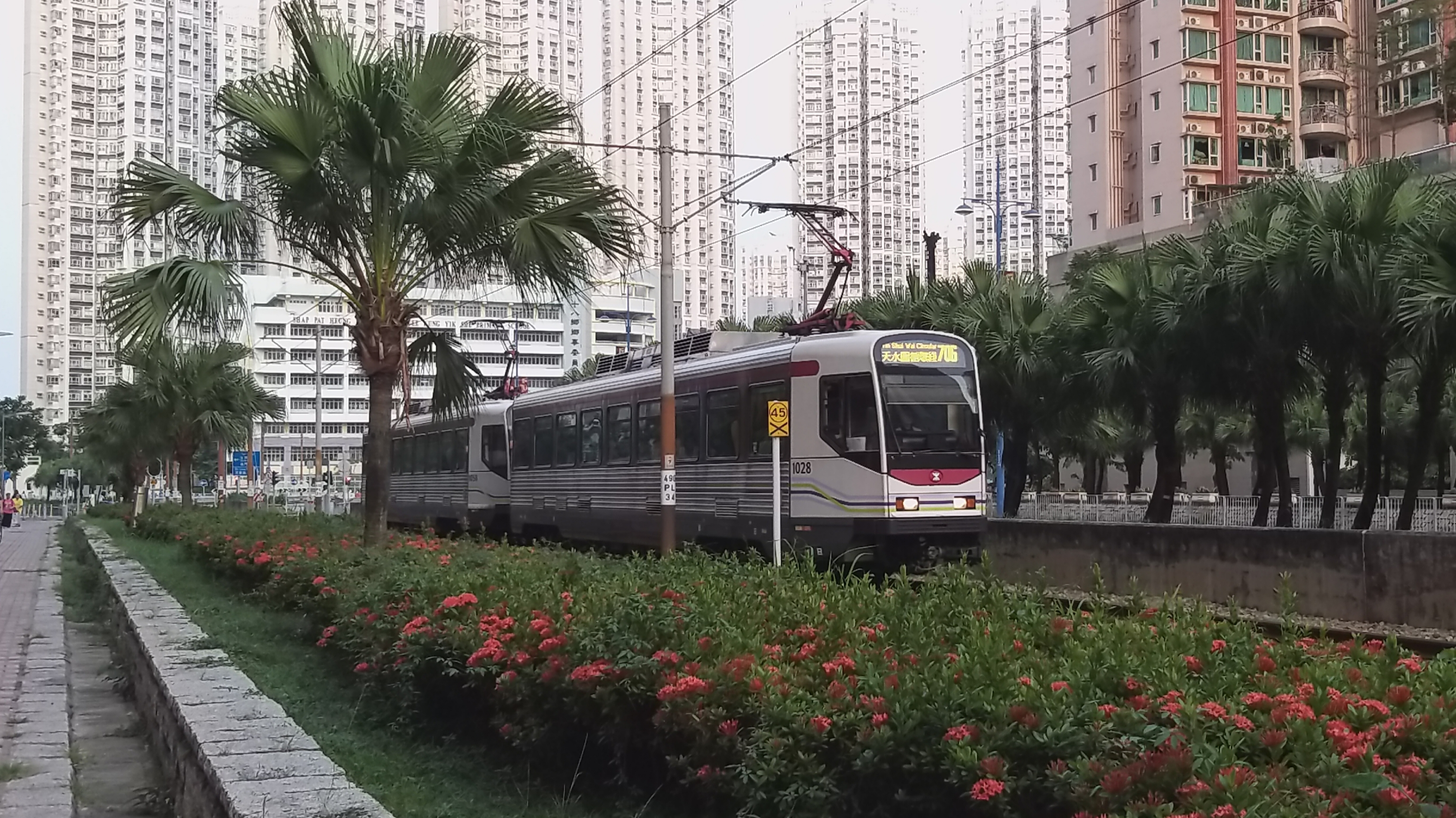 因為車站受到嚴重破壞而改道的706線行經天榮路